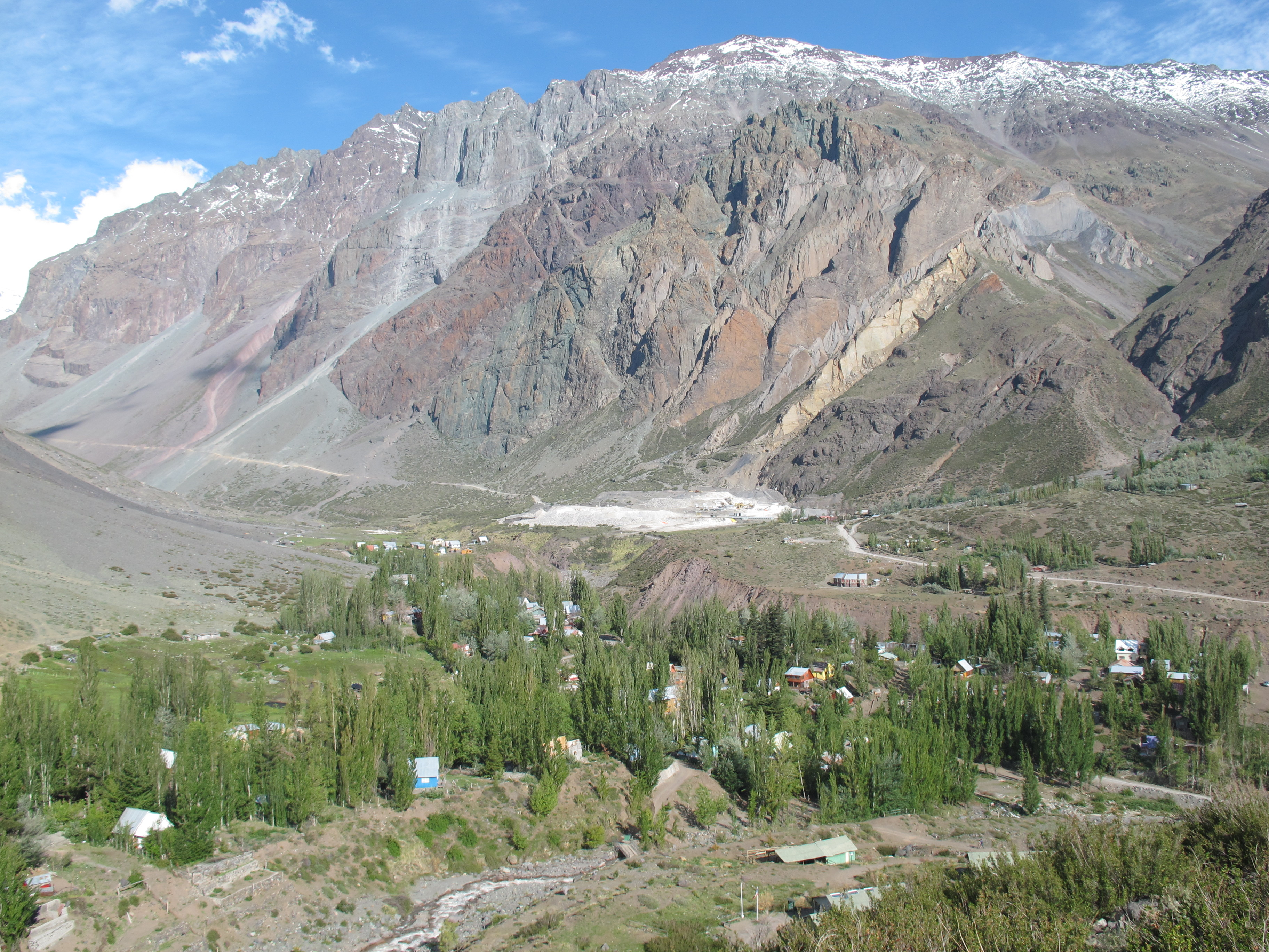 Aldea de Baños Morales en el cajón del Maipo (Chile)